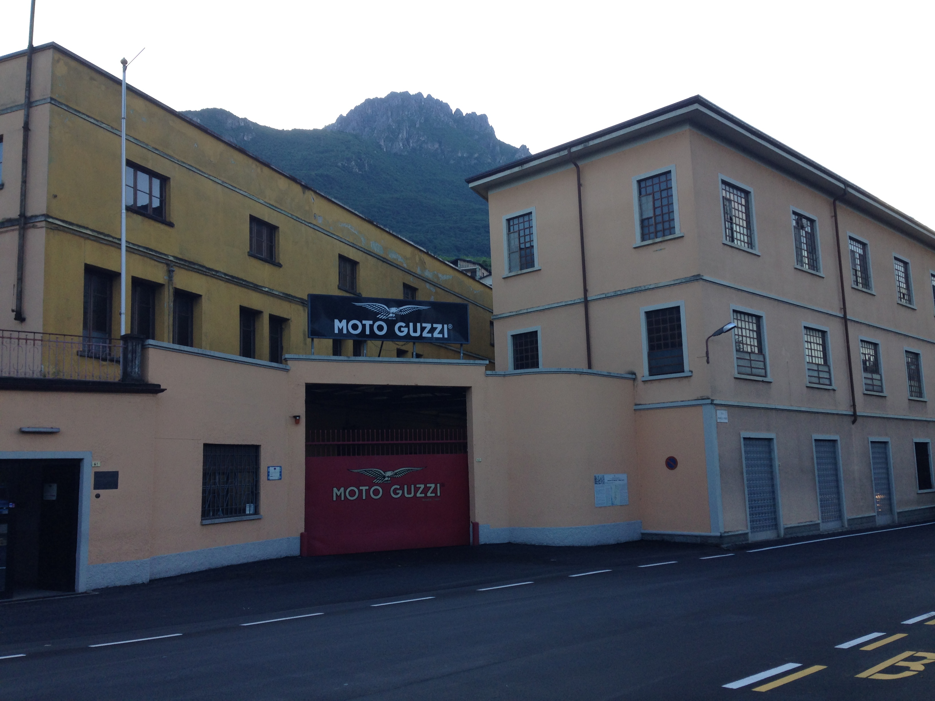 Museo Moto Guzzi Mandello